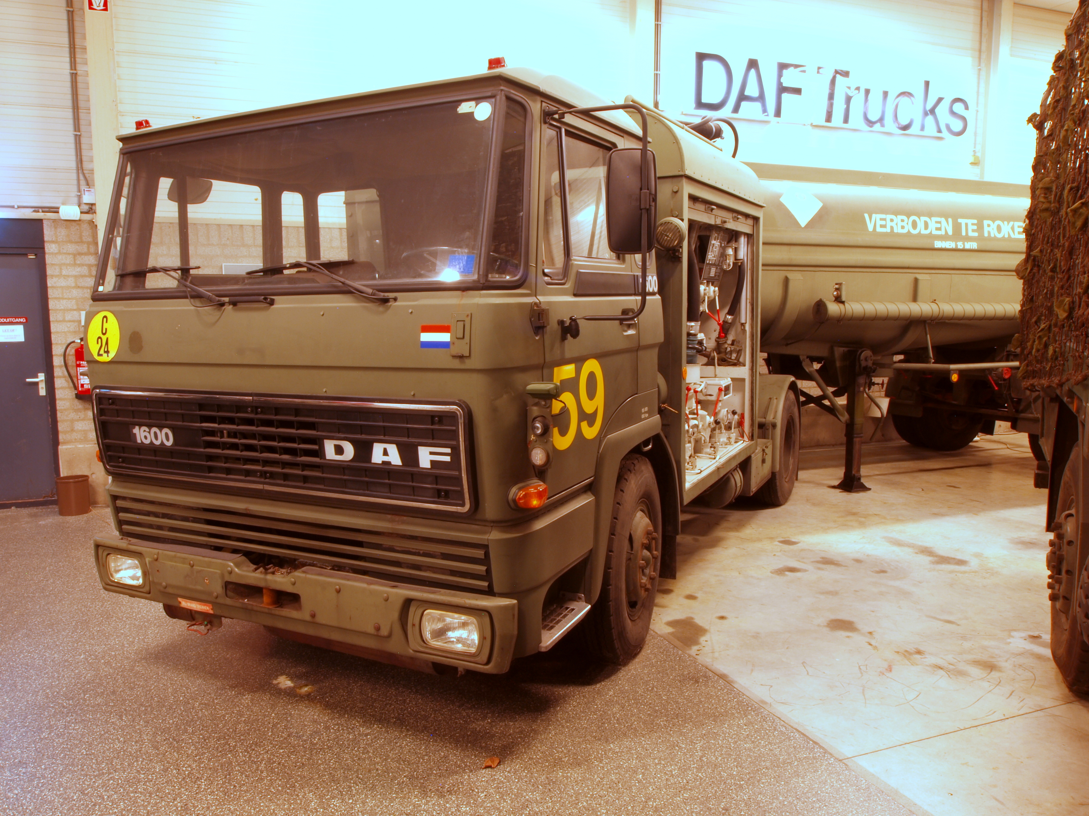 DAF museum